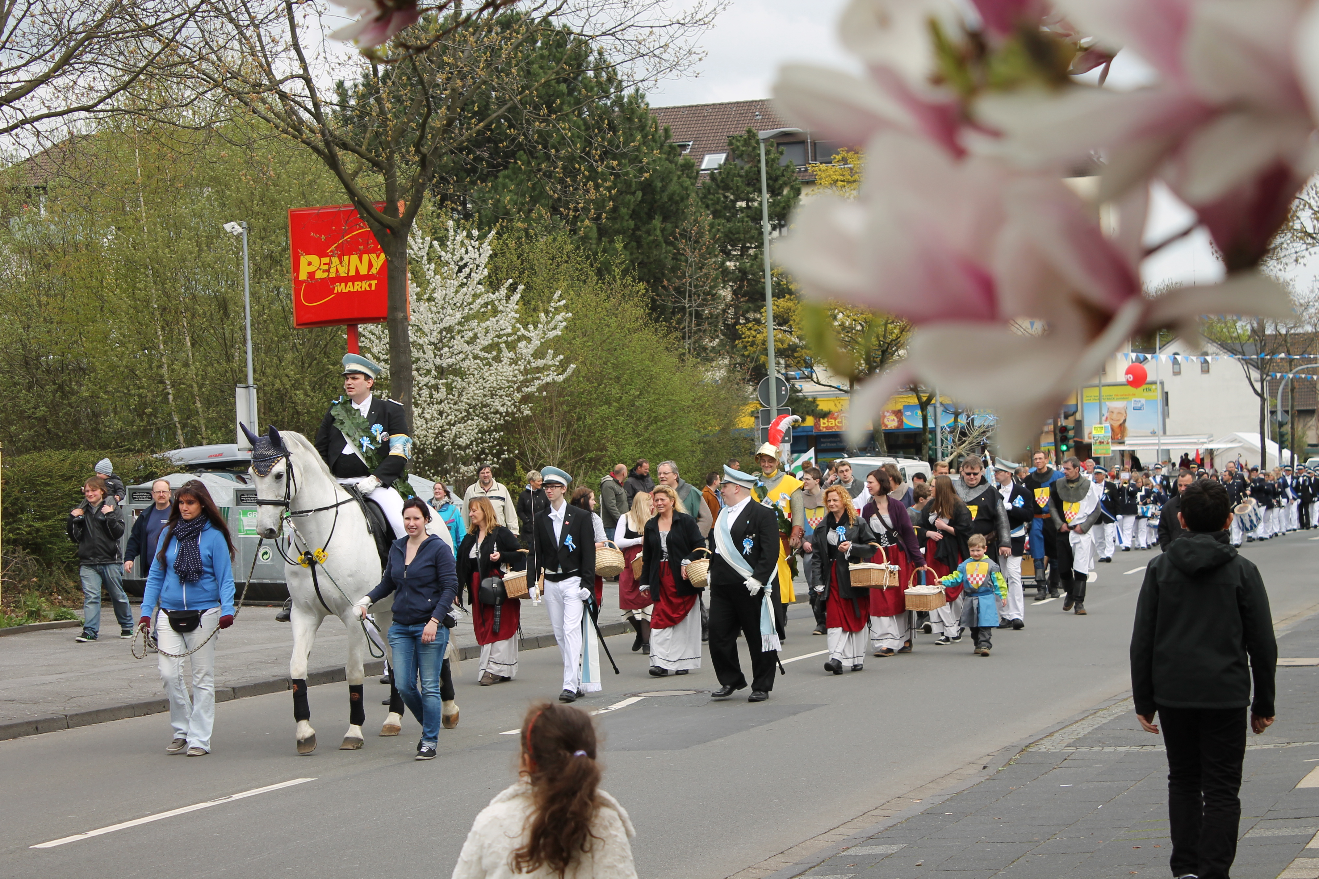 Festumzug zum traditionellen Maiabendfest in Bochum am 27. April 2013. Hier reitet der Junggesellenhauptmann mit seinem Gefolge durch Harpen.